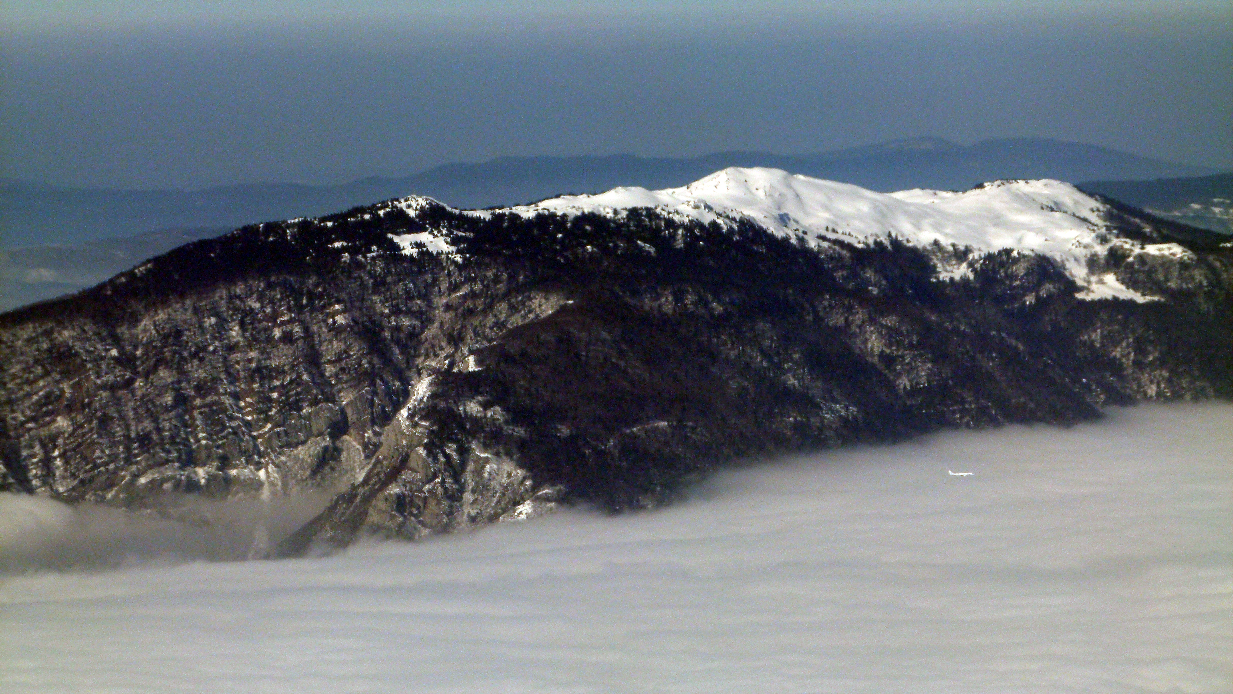 Blick vom Flugzeug auf den Grand Crêt d’Eau, einer Gruppe von Jura-Berggipfeln im französischen Département Ain mit dem höchsten ihrer Gipfel Crêt de la Goutte